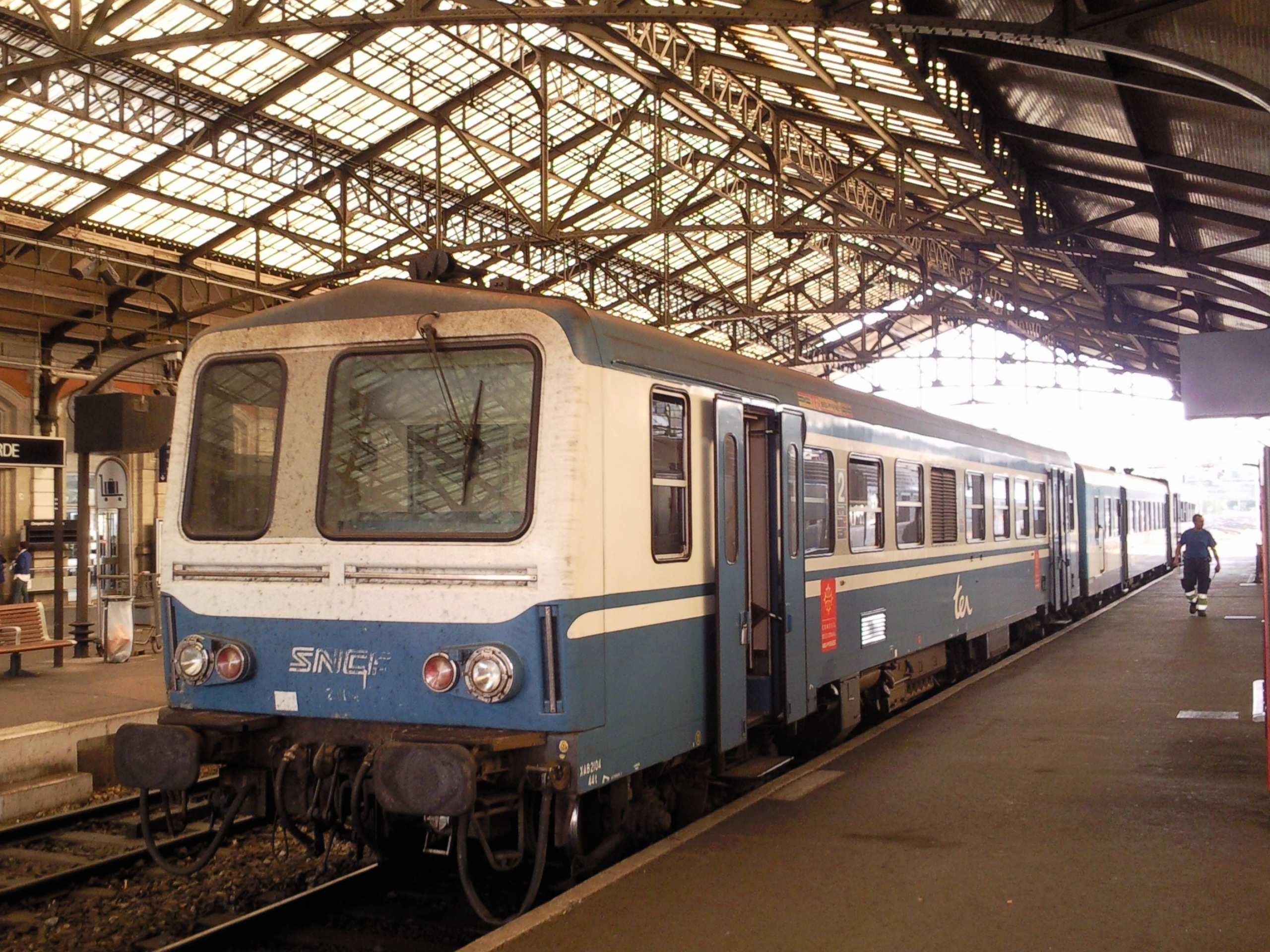 Autorail X 2104 à Brive-la-Gaillarde (Corrèze, France).